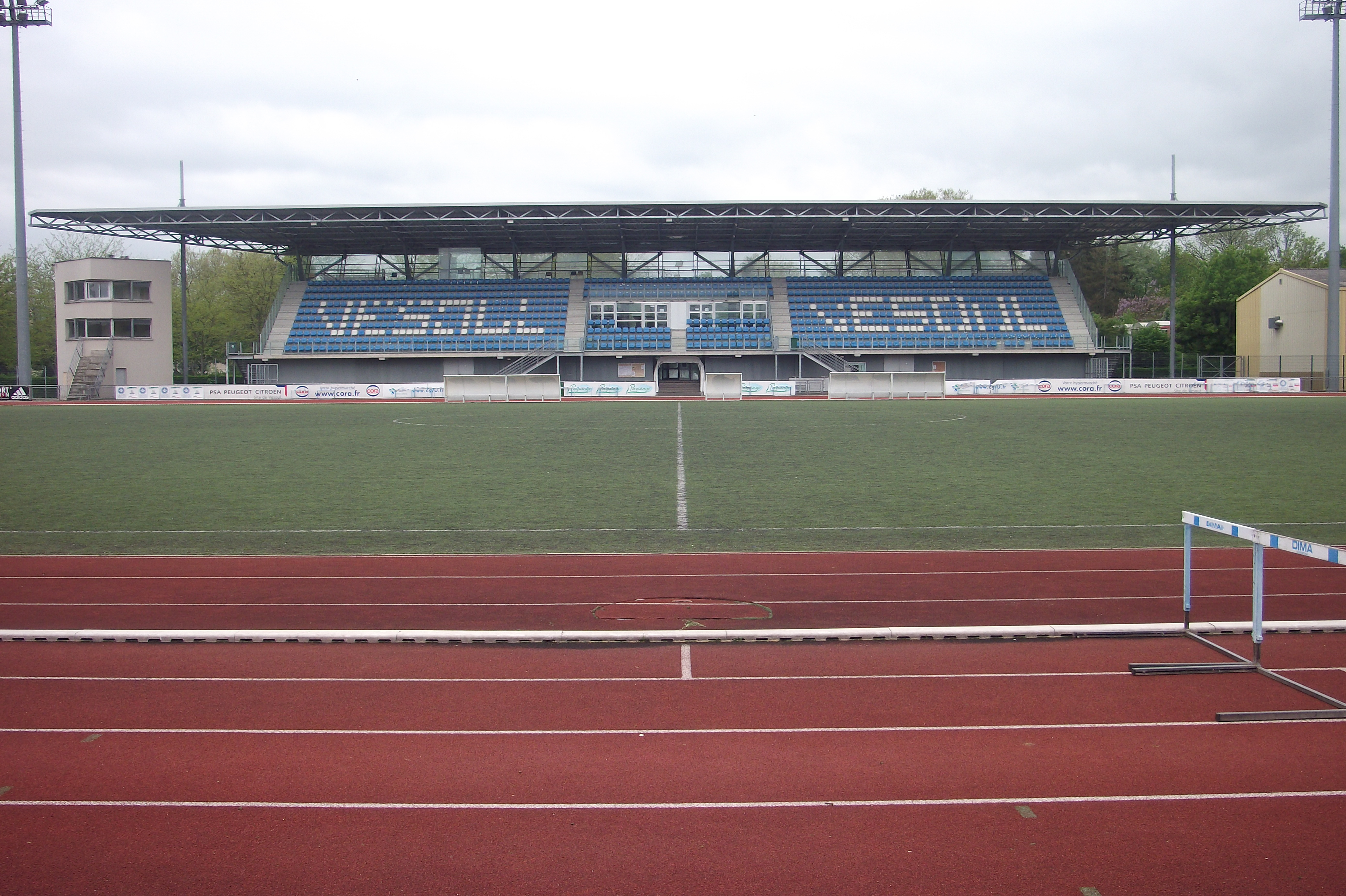 Le stade René-Hologne de Vesoul (Haute-Saône, Franche-Comté)